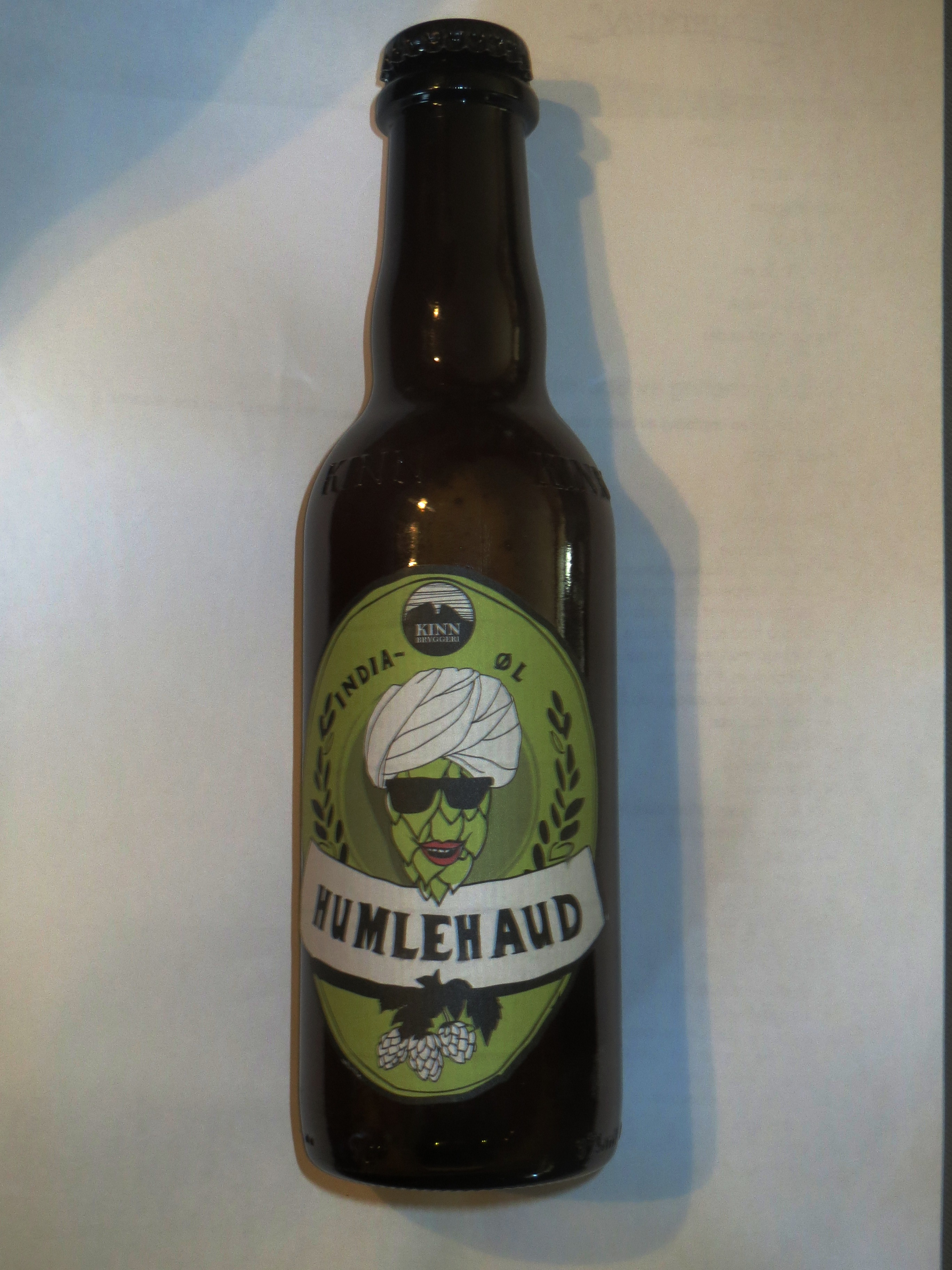 Homlehaud India-øl (India Pale Ale), Kinn Bryggeri, Florø